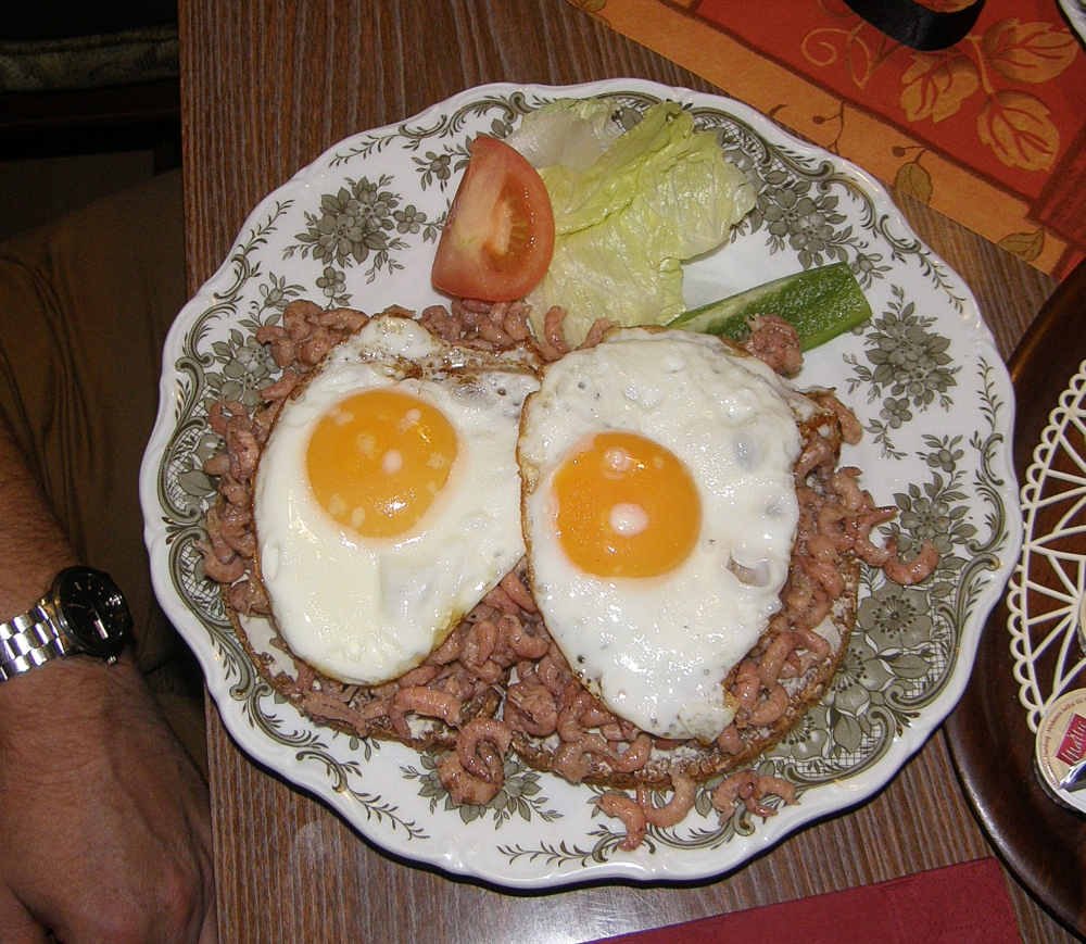 Krabbenfrühstück